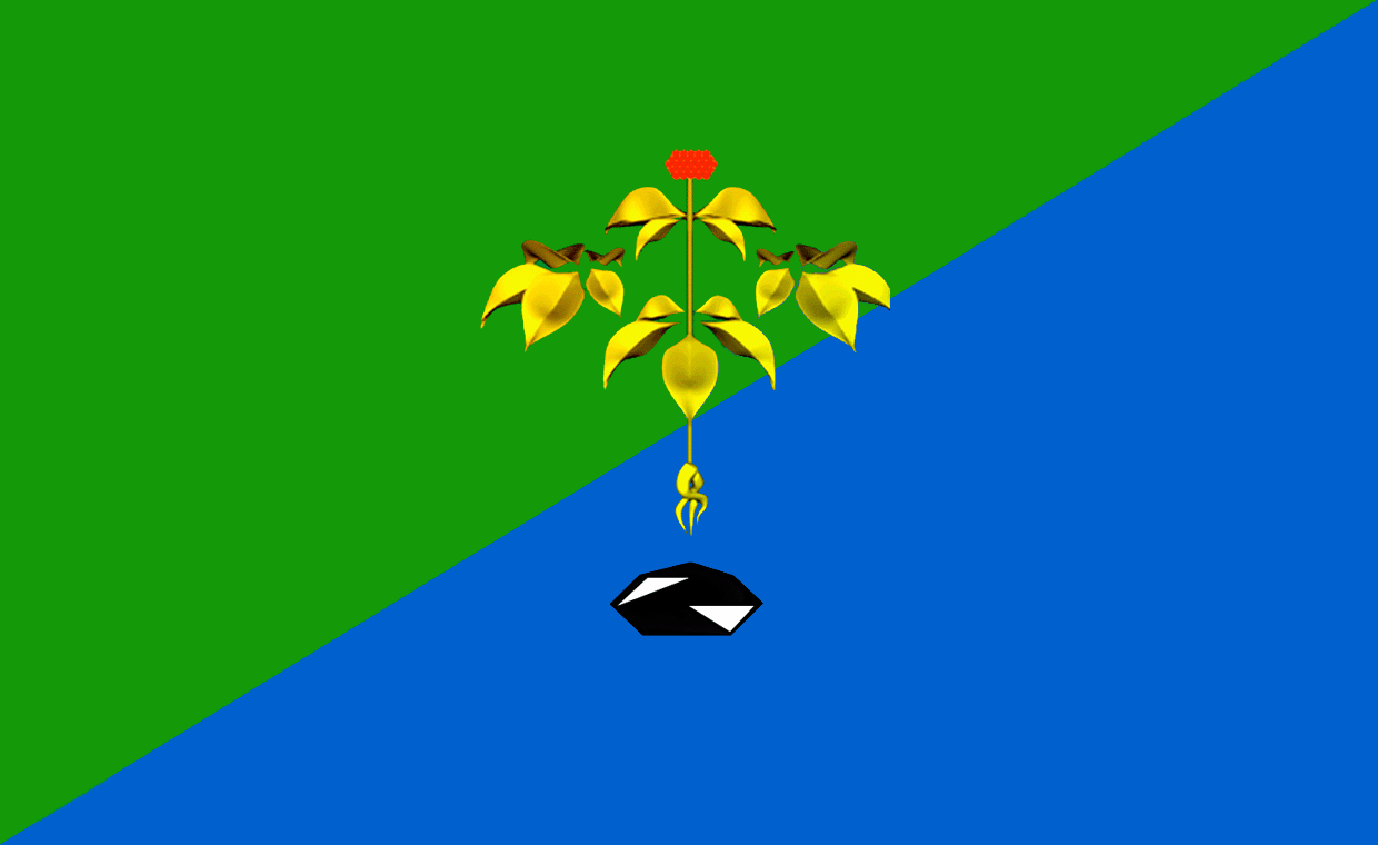 Флаг города Партизанск